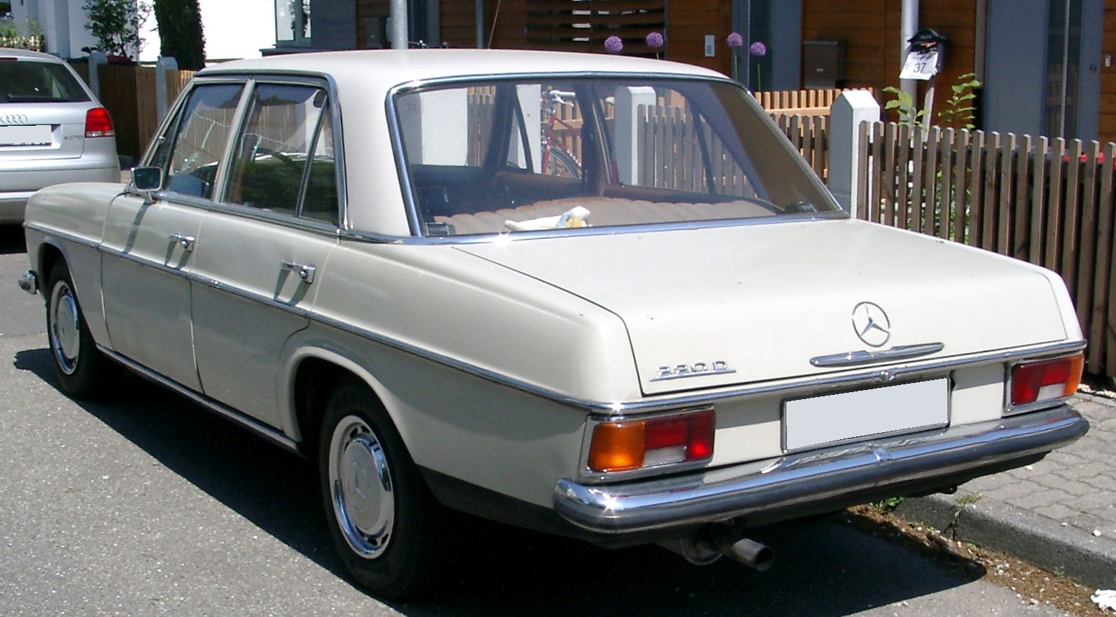 Mercedes-Benz W115